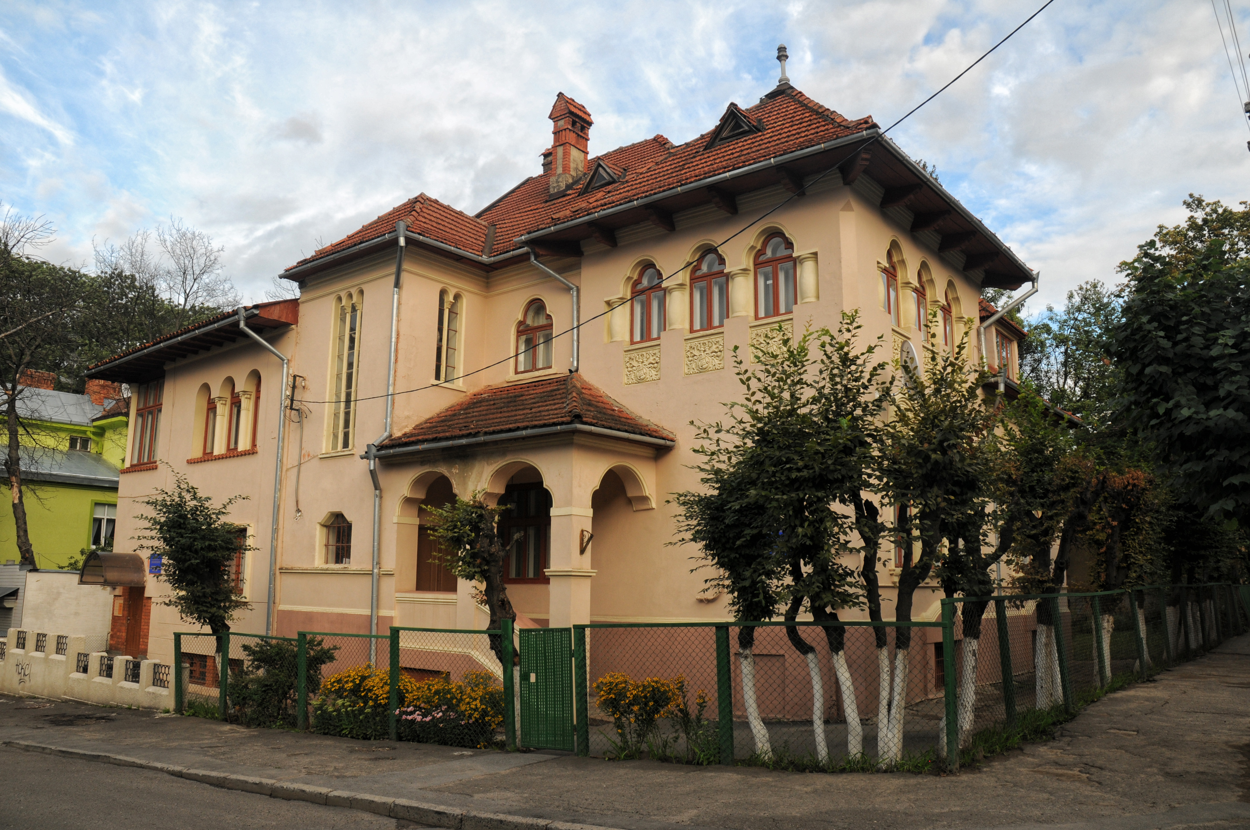 Чернівці, Фрунзе, 3 вілла